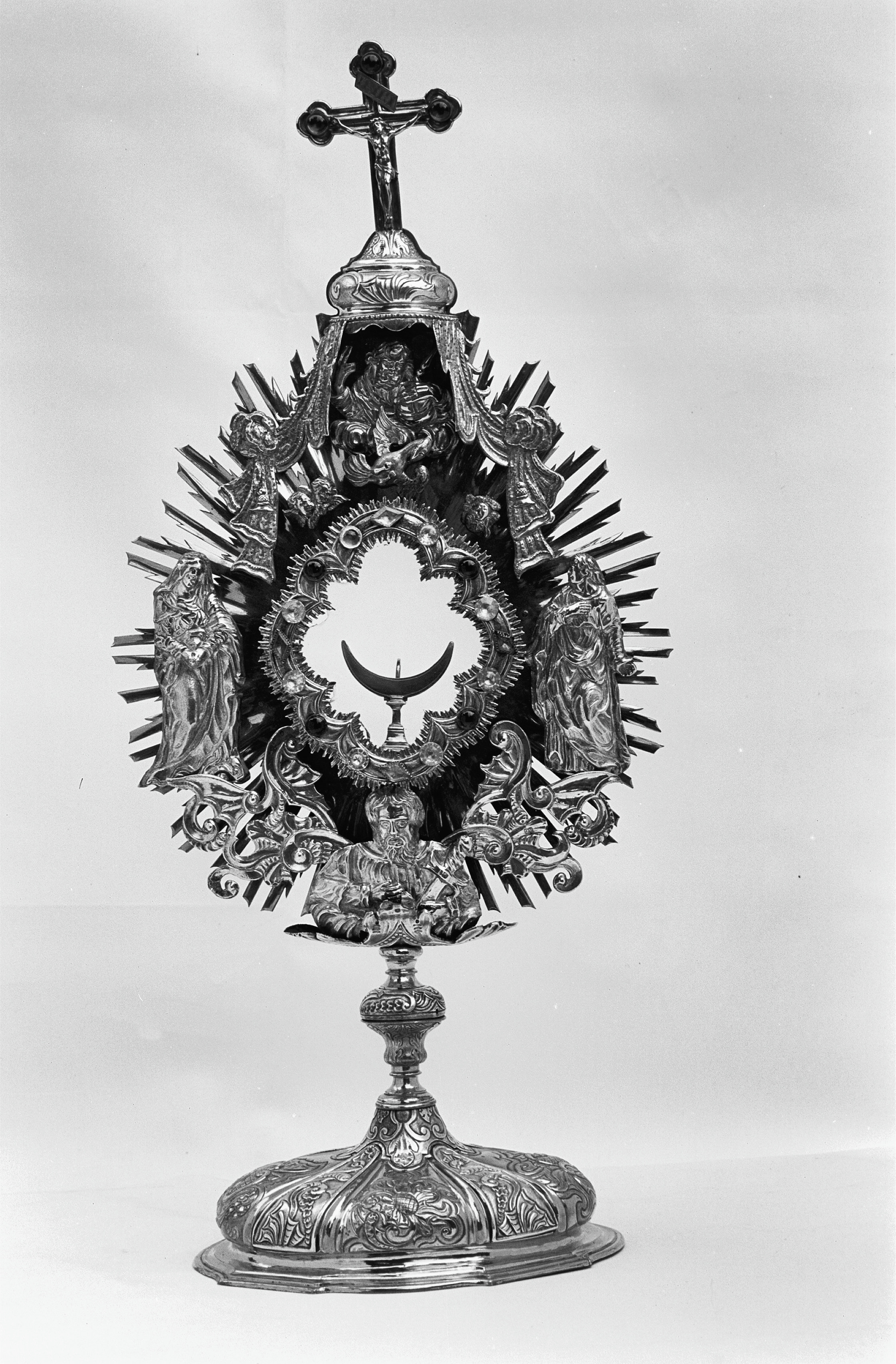 Sint Paulus Kerk: montrans